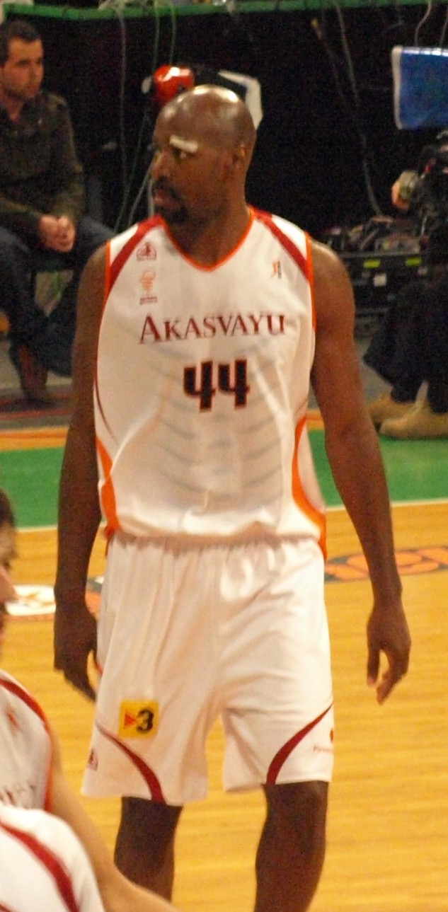 Darryl Middleton con la camiseta del Akasvayu en un partido de los play-off de la liga ACB 07-08